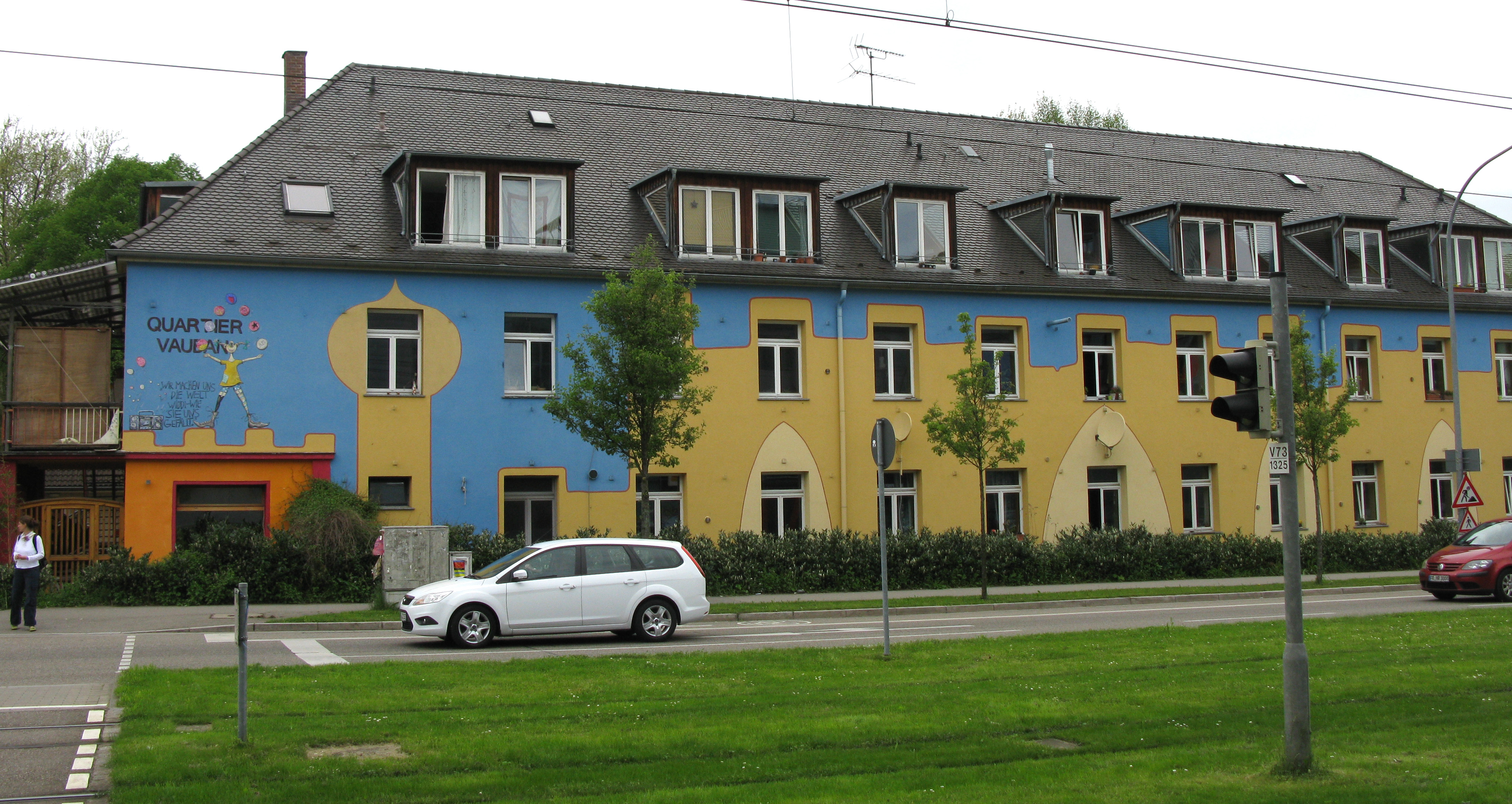 altes Kasernengebäude im Freiburger Stadtteil Vauban mit Beschriftung Quartier Vauban aus der Zeit der französischen Kaserne, links davon war das Kasernentor